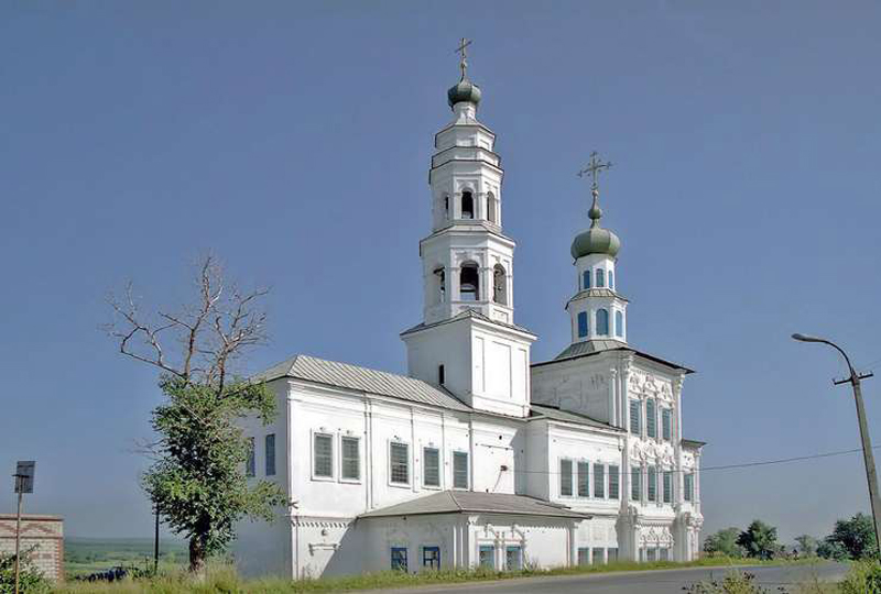 Церковь Иоанна Предтечи в Соликамске